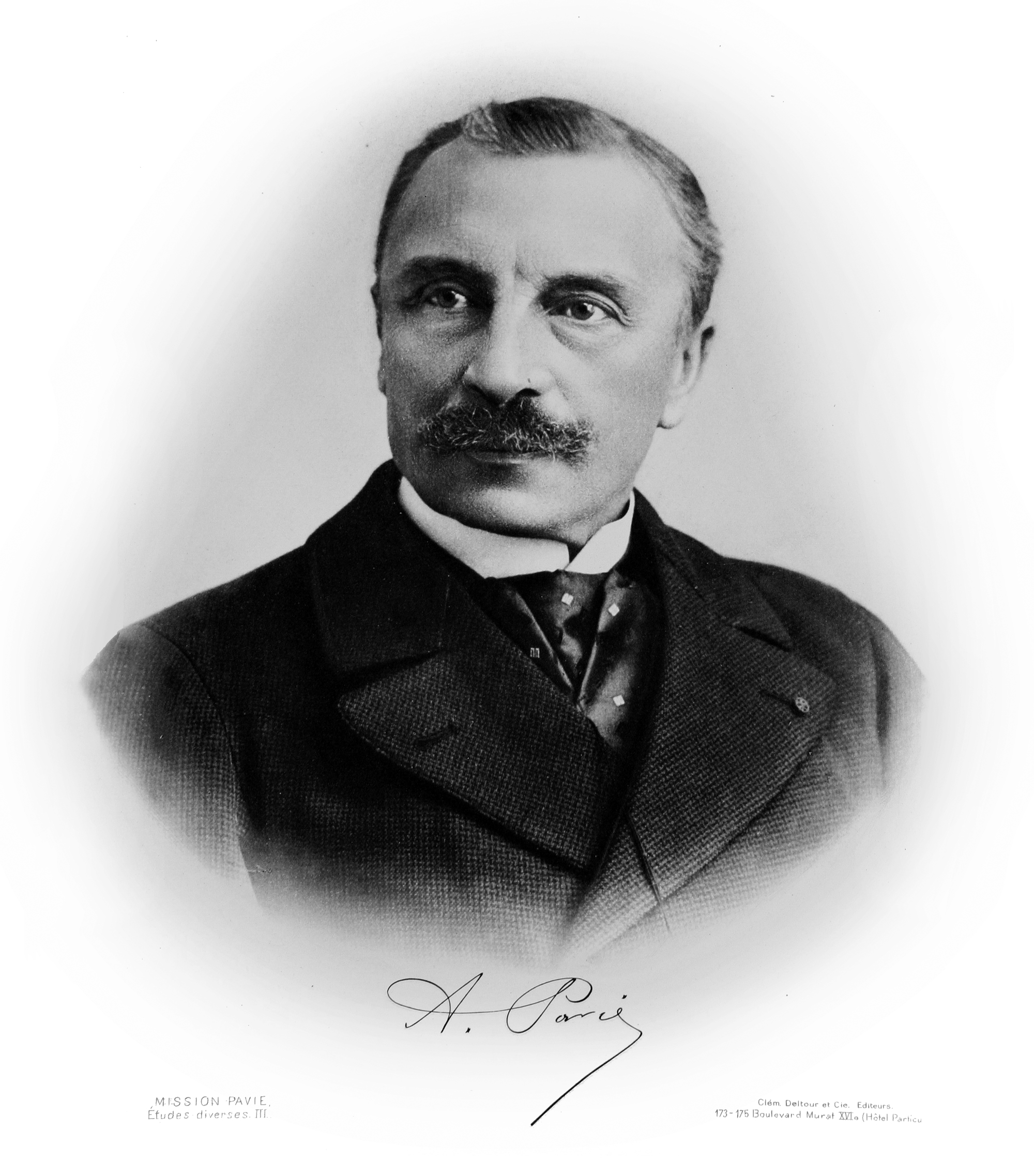 Portrait d'Auguste Pavie (1847-1925) extrait du compte rendu Mission Pavie en Indochine, 1879-1895 (11 vols) Paris, Leroux, 1898-1919. Exemplaire de la bibliothèque patrimoniale de Gray. document domaine public reproduis par mes soins.